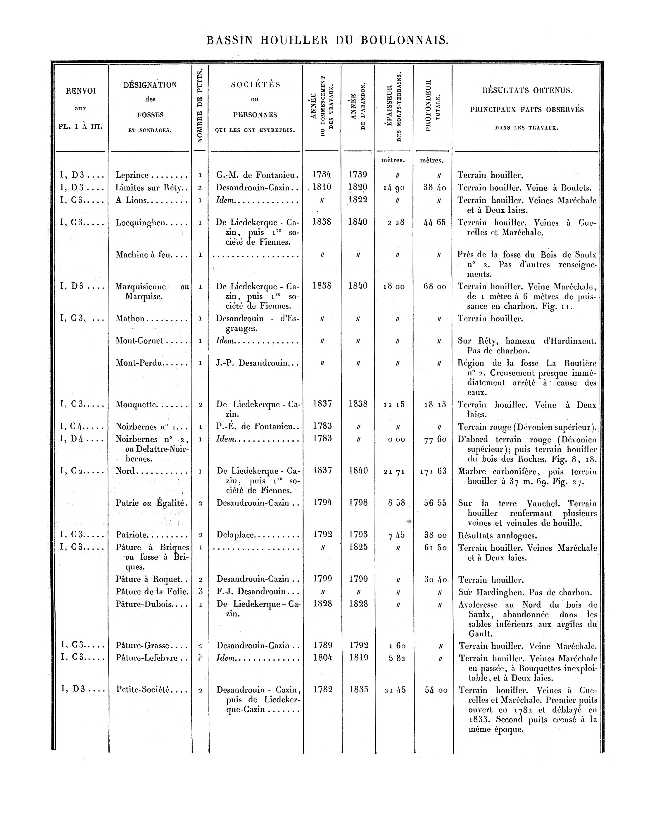 Liste des puits de mine et des sondages. Mines du Boulonnais. Document extrait de Étude des Gîtes Minéraux de la France. Topographie Souterraine du Bassin Houiller du Boulonnais ou Bassin d'Hardinghen, par A. Olry, ingénieur en chef des Mines. Chapitre IX, pages 172 à 189.